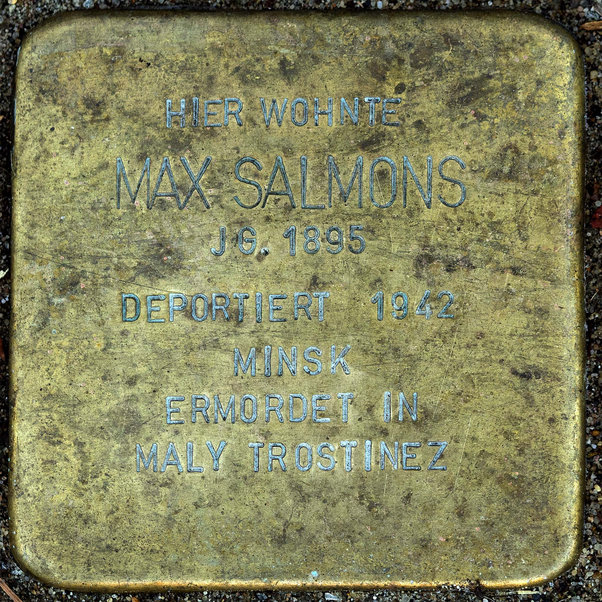 Stolperstein für Salmons, Max